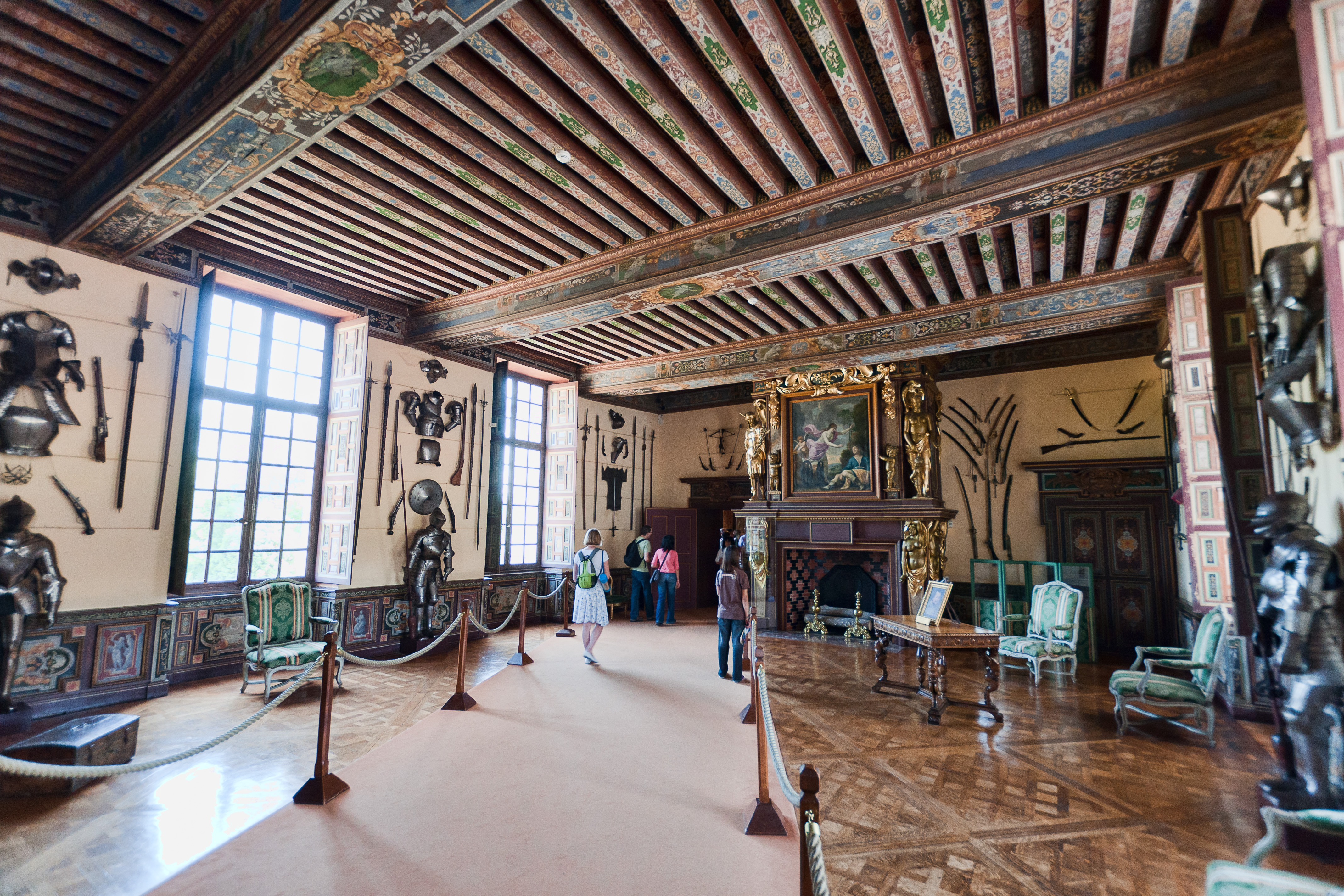 Chateau de Cheverny - Salle d'ArmesLe mobilier comprend un ensemble de fauteuils Régence, signés Jean-Baptiste Boulard.